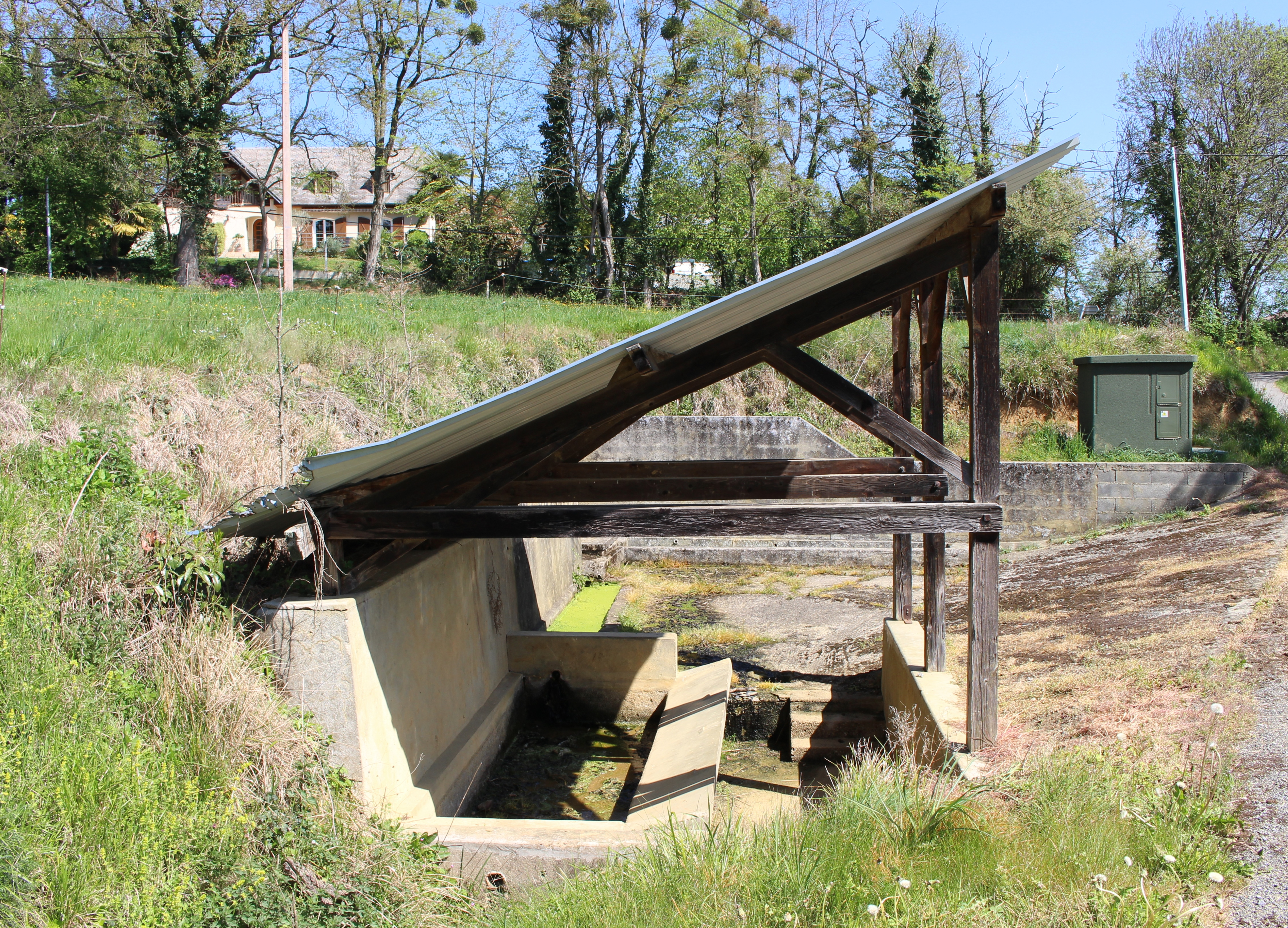 Lavoir de Fréchou-Fréchet (Hautes-Pyrénées)